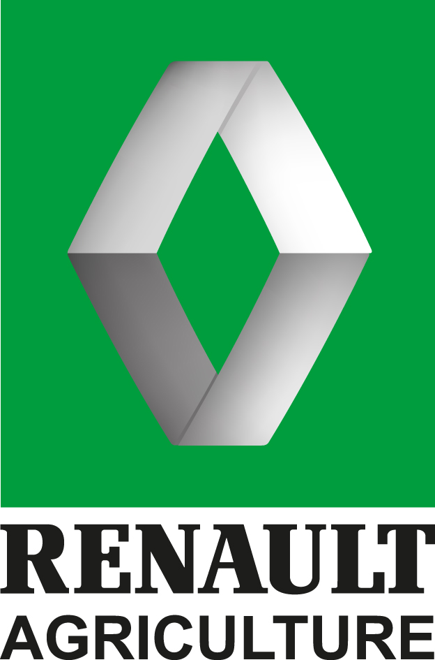 le logo commerciale de Renault agriculture